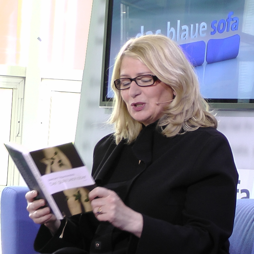 Nur für redaktionelle Nutzung / Editorial use only. Dieses Foto dürfen Sie honorarfrei nutzen, wenn Sie folgenden credit beachten: Copyright: Das blaue Sofa / Club Bertelsmann. Steinunn Sigurdardóttir studierte Psychologie und Philosophie am University College in Dublin und hat viele Jahre für das isländische Radio und Fernsehen gearbeitet. Mit ihrem ersten Gedichtband „Sífellur“ veröffentlichte sie im Alter von 19 Jahren. 1995 erhielt sie den Isländischen Literaturpreis. International wurde sie durch ihre Romane „Der Zeitdieb“ und „Herzort“ bekannt. Ihr Bestseller „Der Zeitdieb“ wurde mit Emmanuelle Béart und Sandrine Bonnaire in den Hauptrollen in Frankreich verfilmt. Sigurdardottir hat an unterschiedlichen Orten in Europa, den USA und Japan gelebt. Heute pendelt sie zwischen Reykjavík und Berlin.